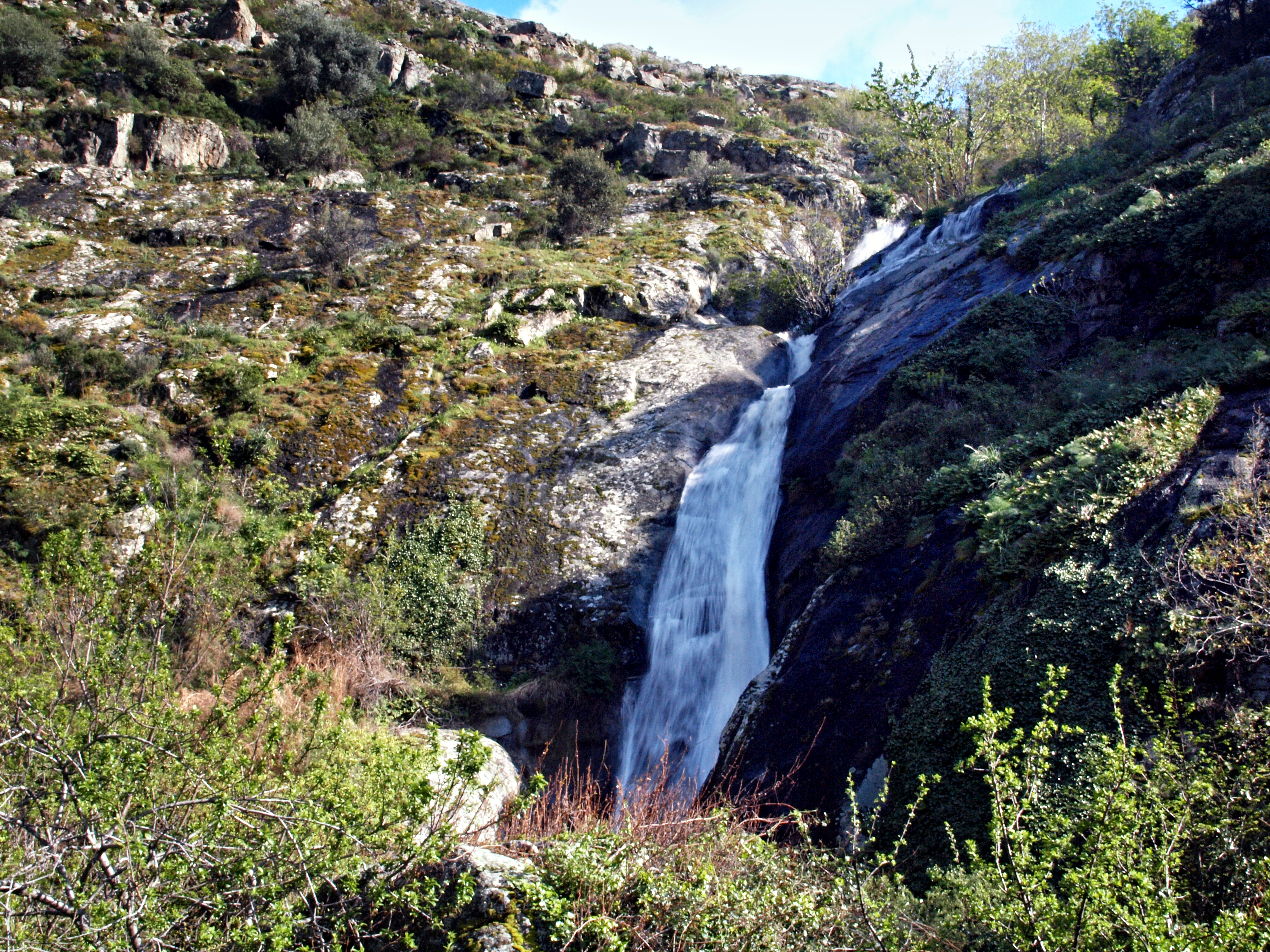 Muro, Balagne (Corse) - Cascade de Nunziata sur le ruisseau d'Orsoni (ou ruisseau de Leca), affluent du Regino (fleuve)